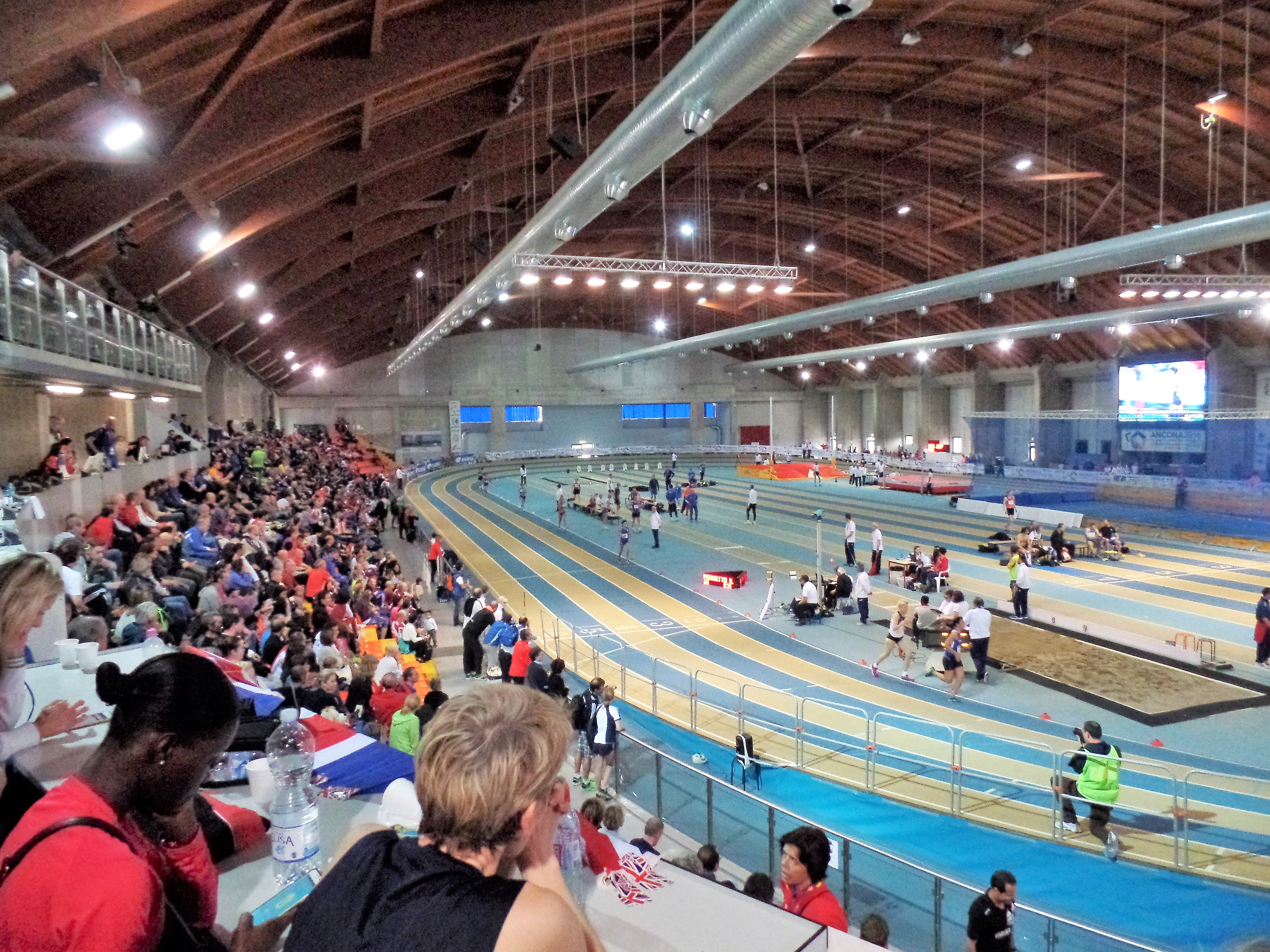 Palasport Indoor Ancona